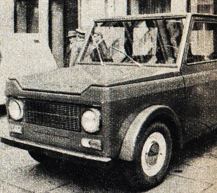 Samochód rolniczy Warta wyprodukowany w Poznaniu w 1971.